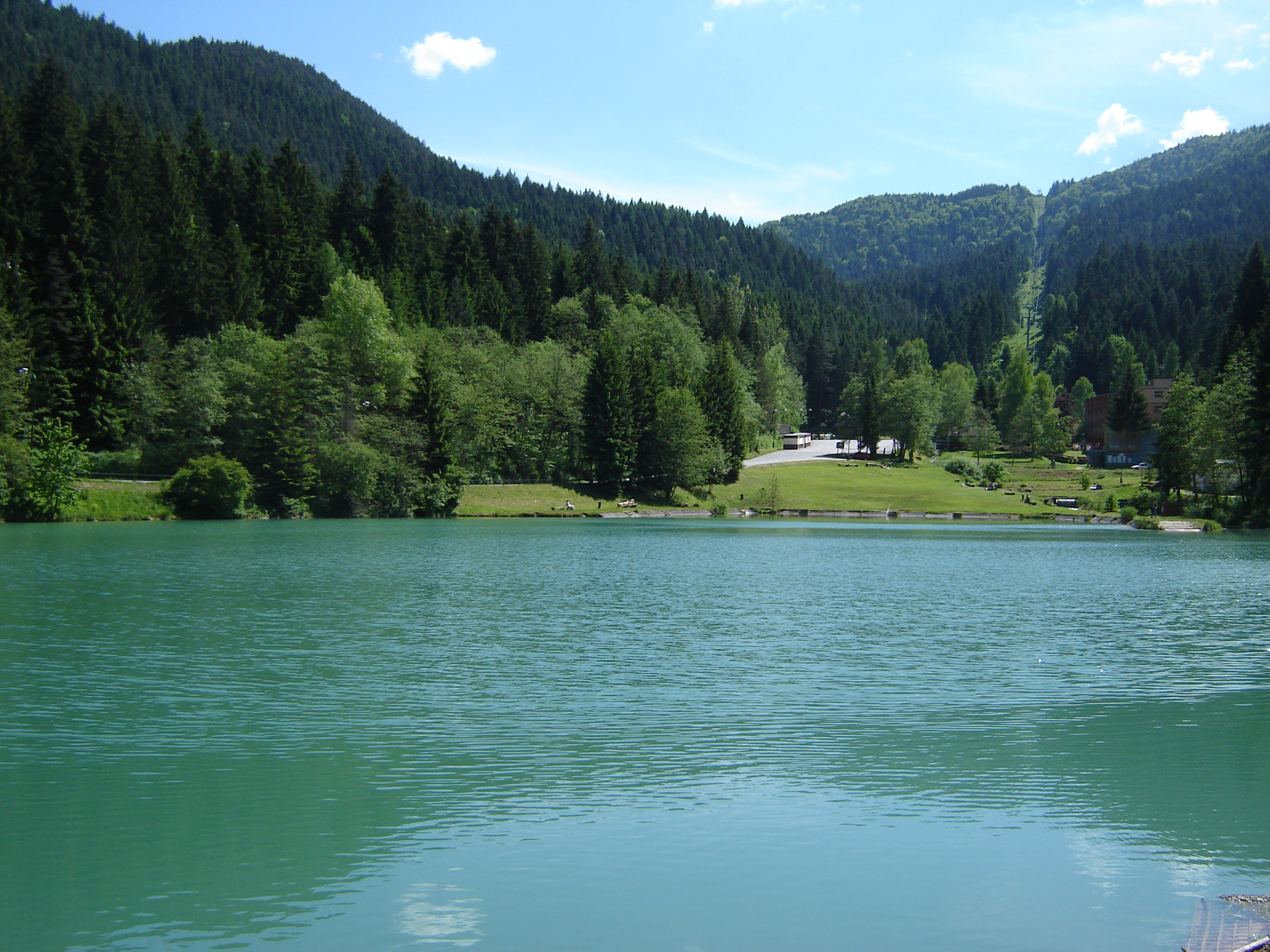 Vodná nádrž Hrabovo, v pozadí kabínková lanovka na Malinô-Brdo